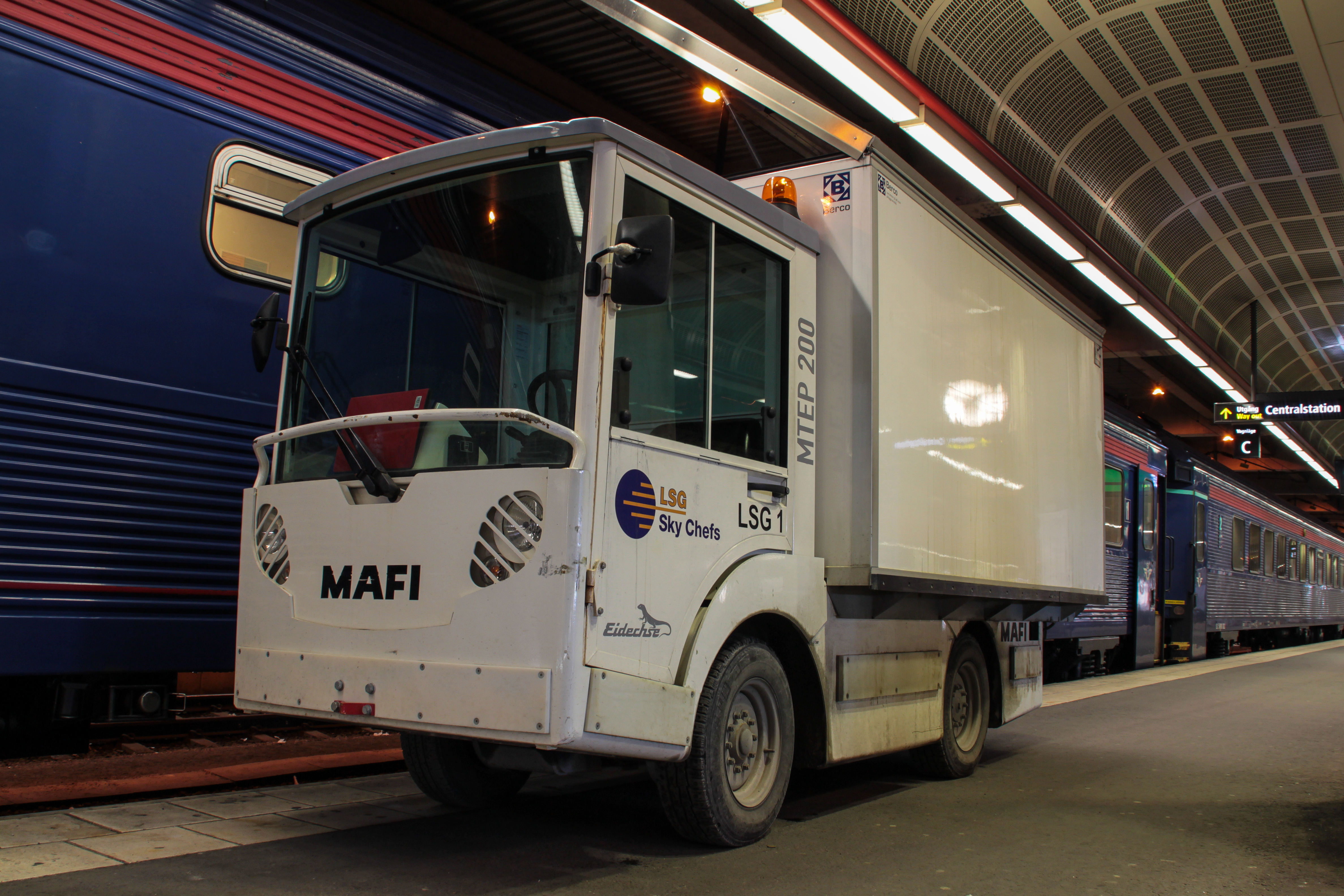 Mafi Mtep 200 på Stockholms centralstation i LSG Sky Chefs färger, med luckan öppen och betjänar ett Intercity-tåg ankommet från Dalarna.